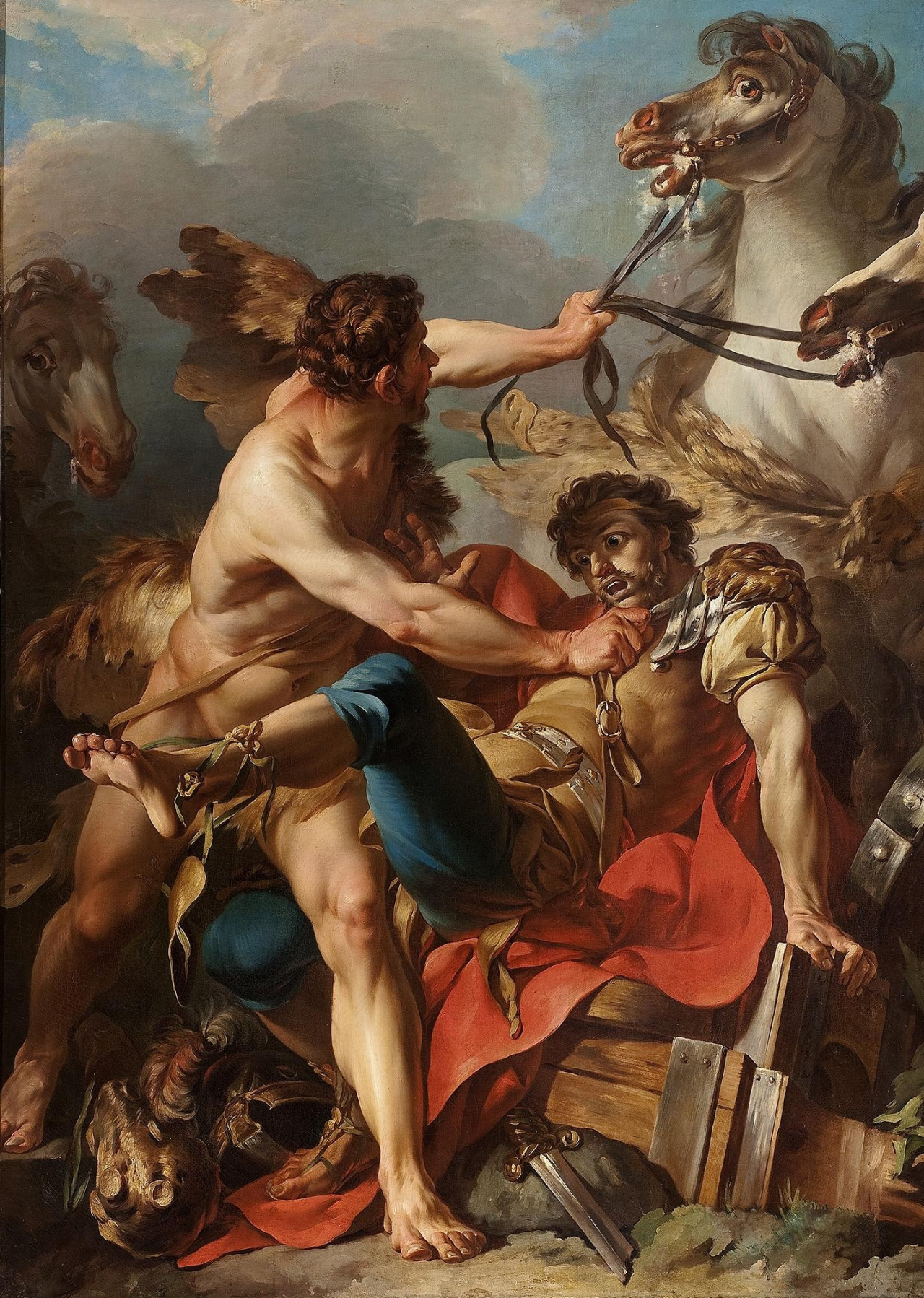 Le cruel Diomède, roi des Bistognes (Thrace), donnait les naufragés qui abordaient ses rivages à dévorer à ses chevaux. Pour le huitième de ses travaux, Hercule les dompte et leur livre Diomède en pâture.